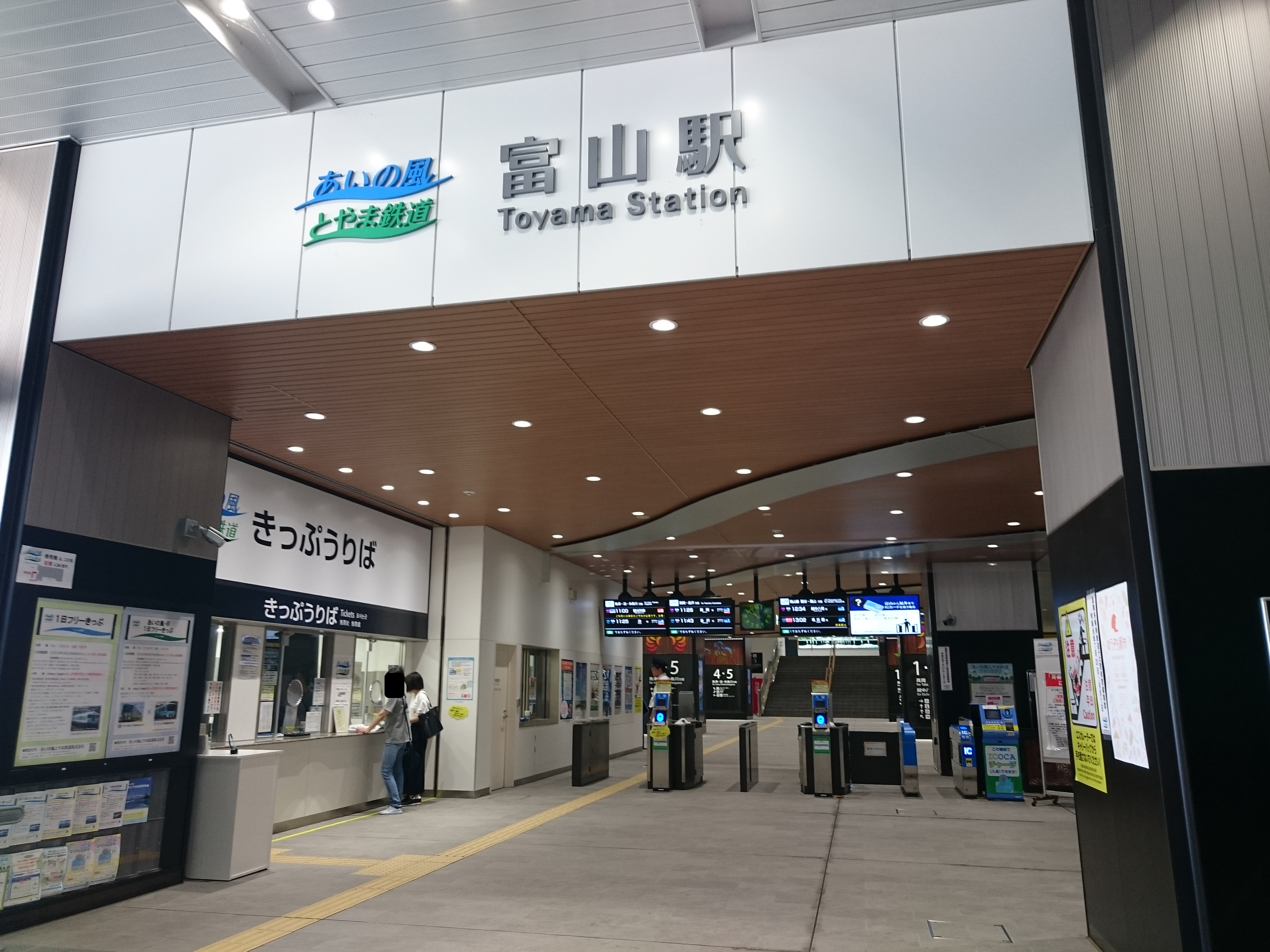 あいの風とやま鉄道 富山駅の新しいコンコース Sony Xperia Z3